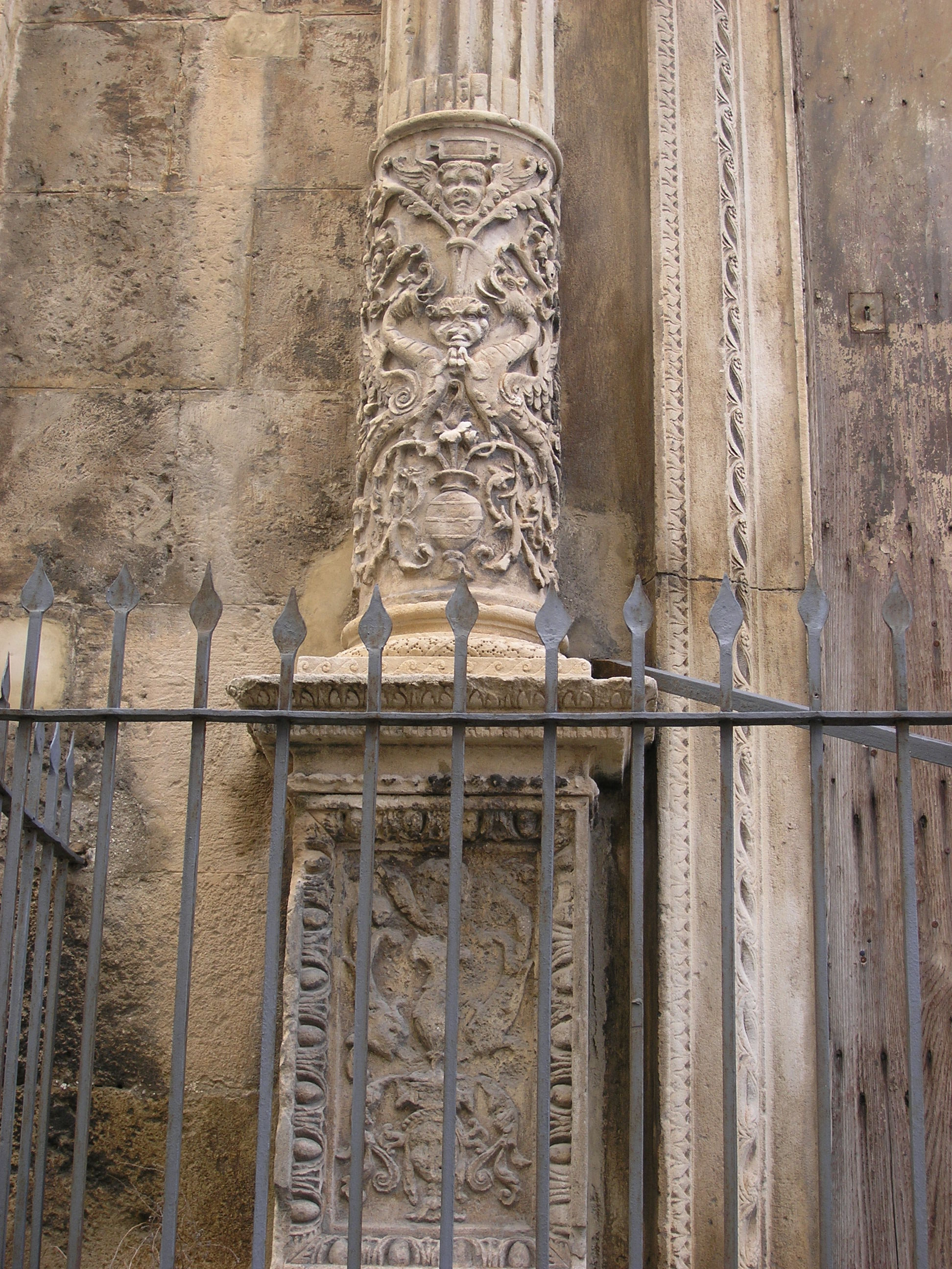 Sicilianu: Crèsia di Sant'Àgata - Guilla - dittagghiu